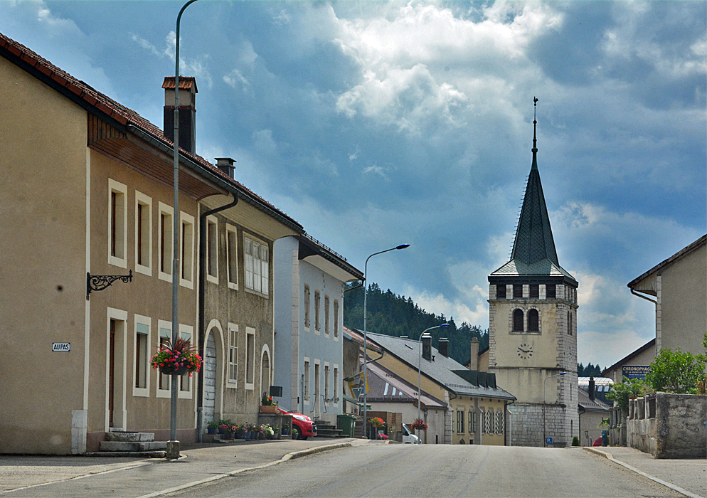 Le Lieu, Vallée de Joux